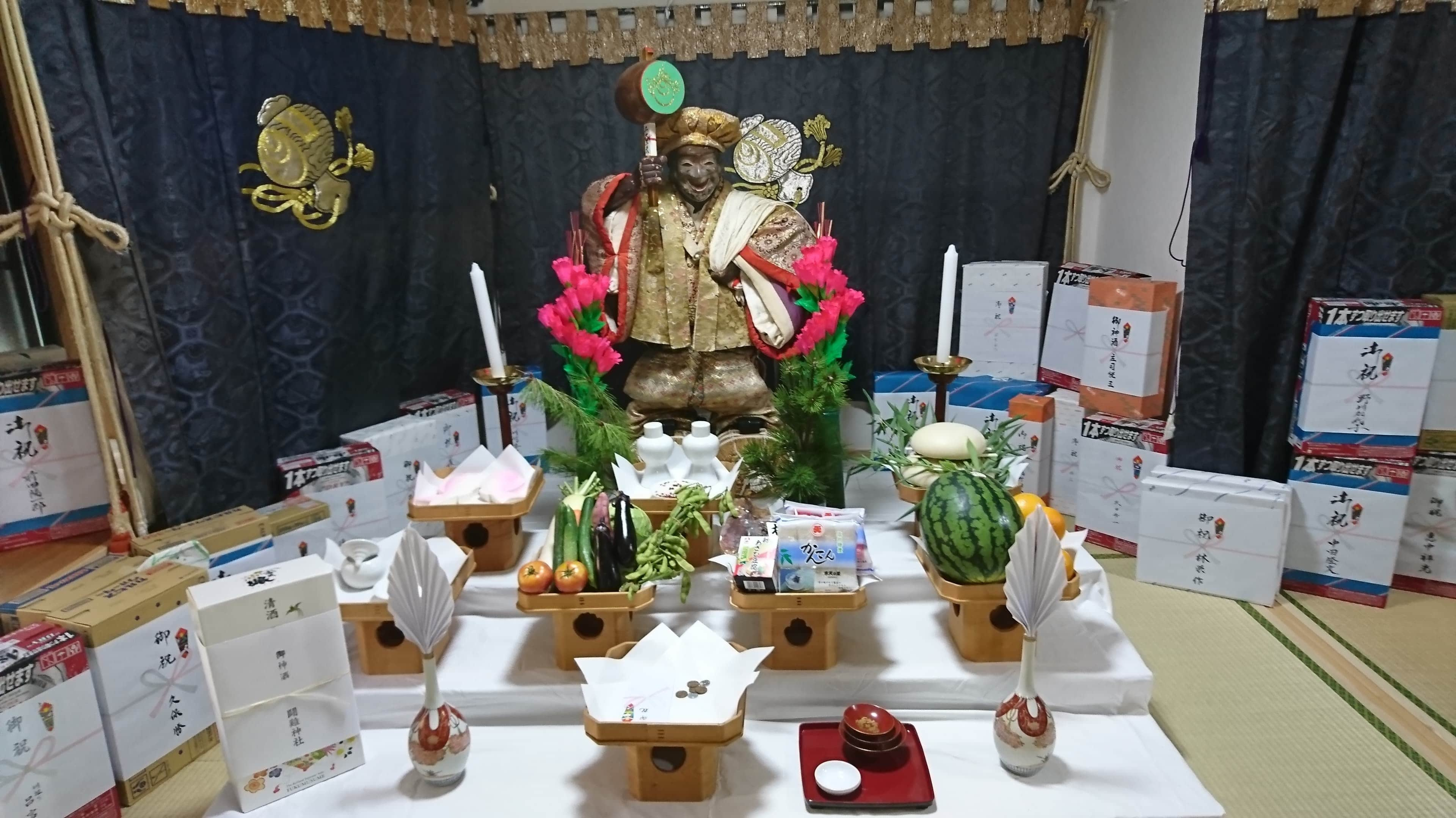 2017年7月頃